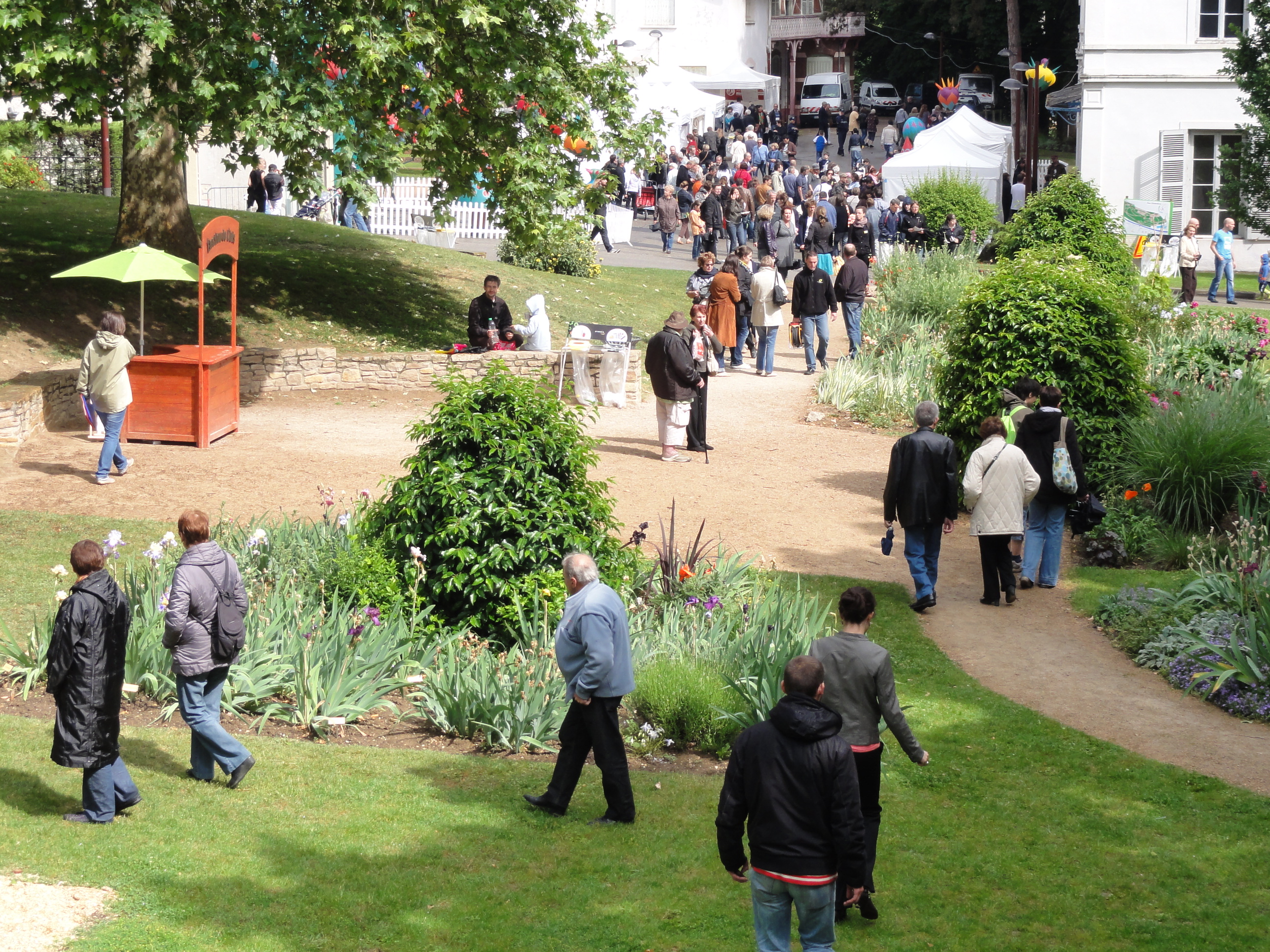 Iriseraie du parc Chabrières (Oullins)